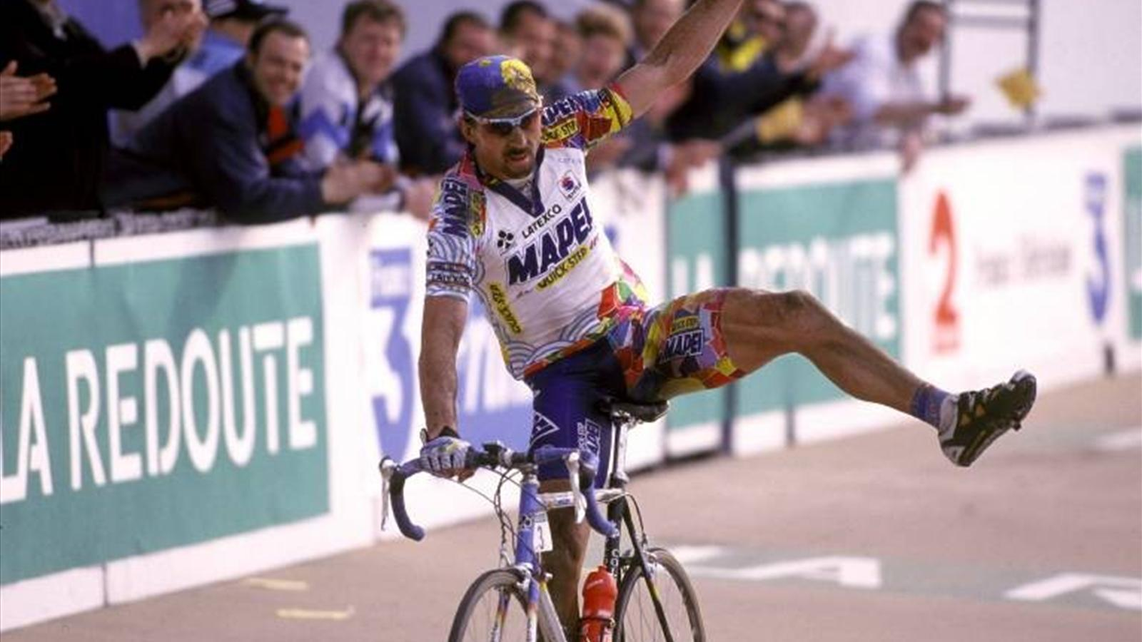 Johan Museeuw gagne sur le vélodrome de Roubaix en l'an 2000 et montre sa rotule brisée en 1998.